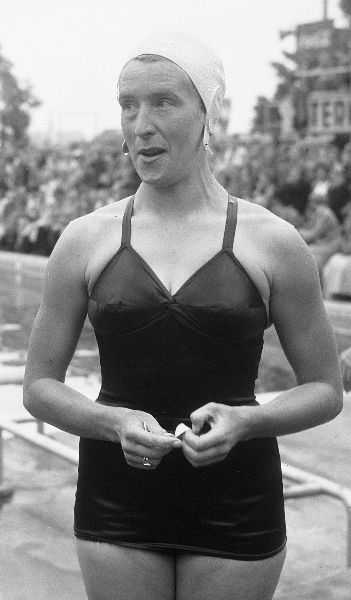 Leny Lanting-Keller